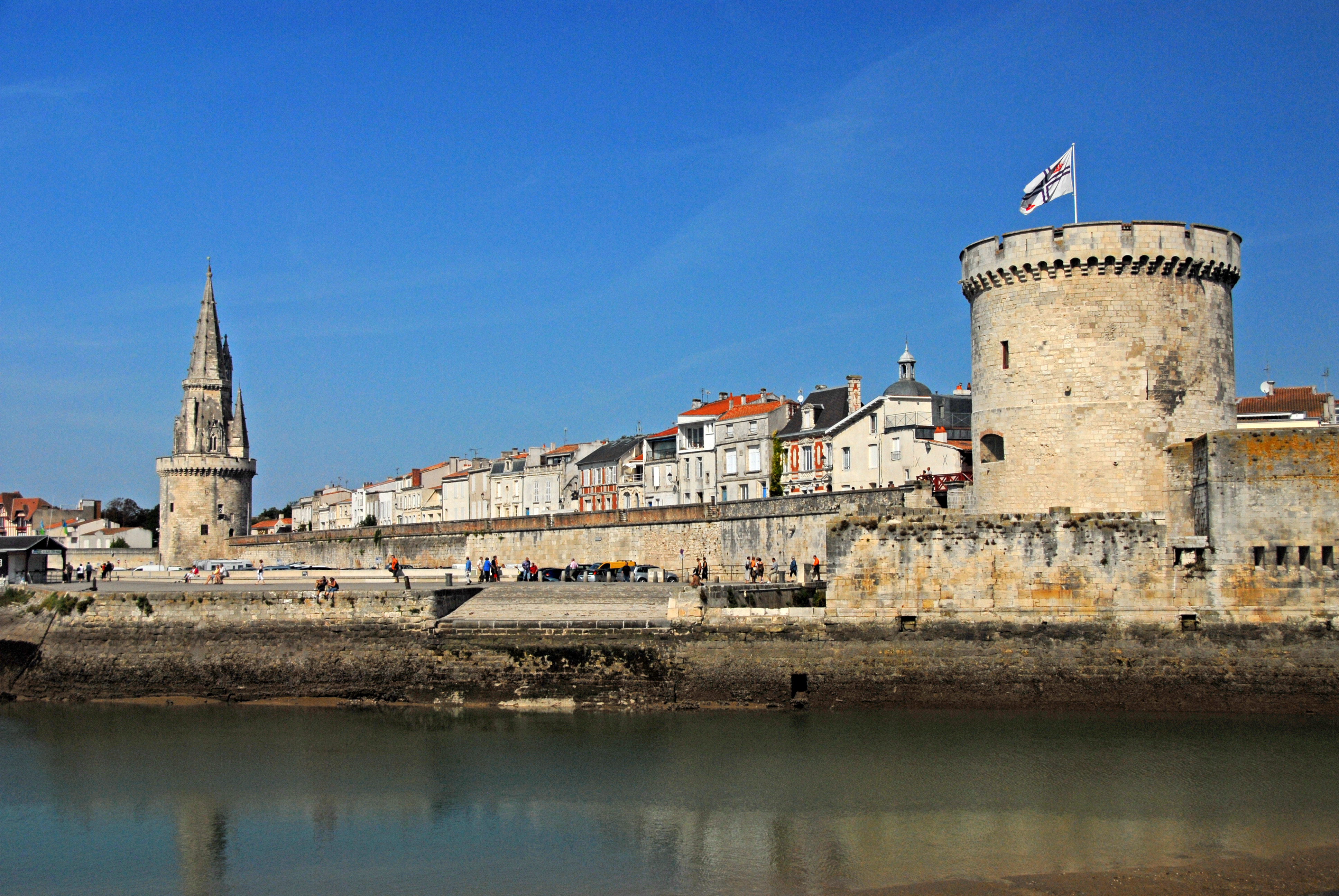 La Rochelle, Tour de la Lanterne, Wehrmauer, Tour de la Chaine